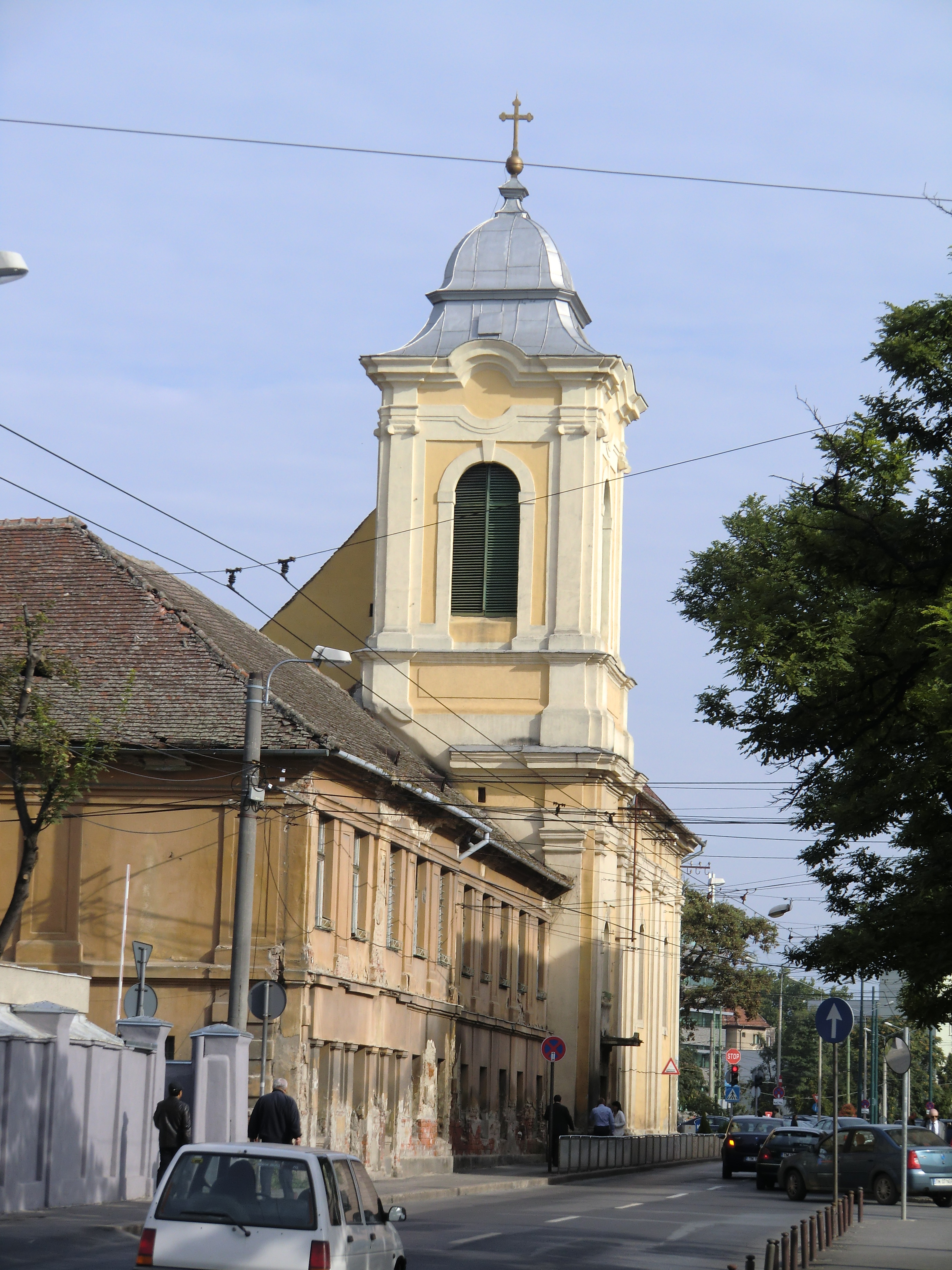 Griechisch katholische Kirche am Piata Timisoara 700 und Augenklinik Timisoara